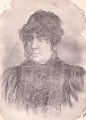 Antonietta Klitsche de la Grange (1832-1912), Buchautorin , Enkeltochter des Prinzen Louis Ferdinand von Preußen